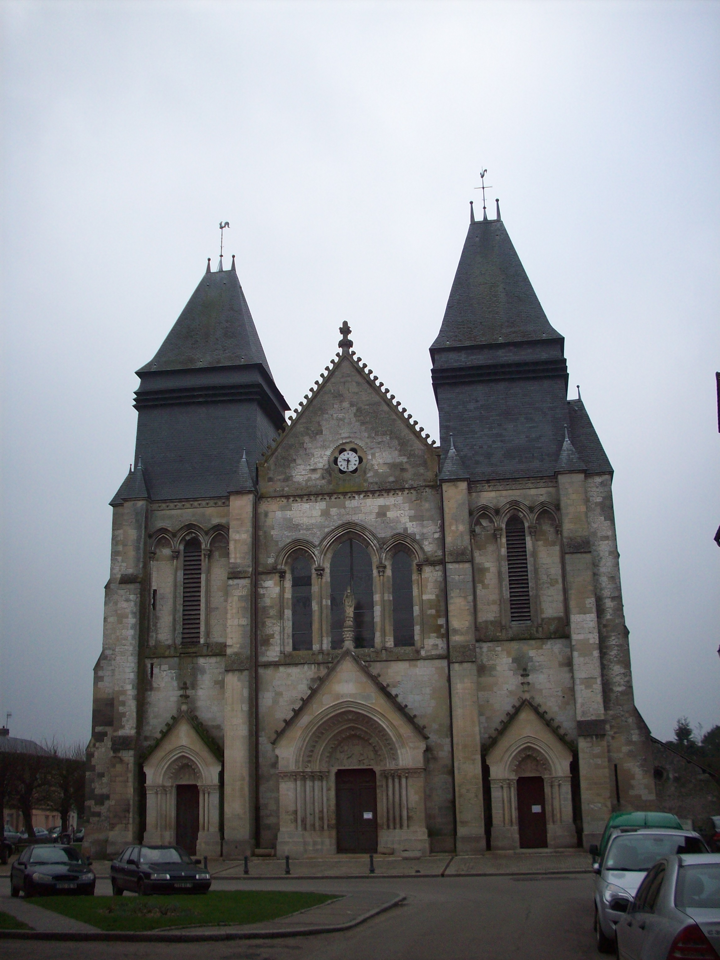 Collégiale Saint-Hildevert de Gournay-en-Bray.